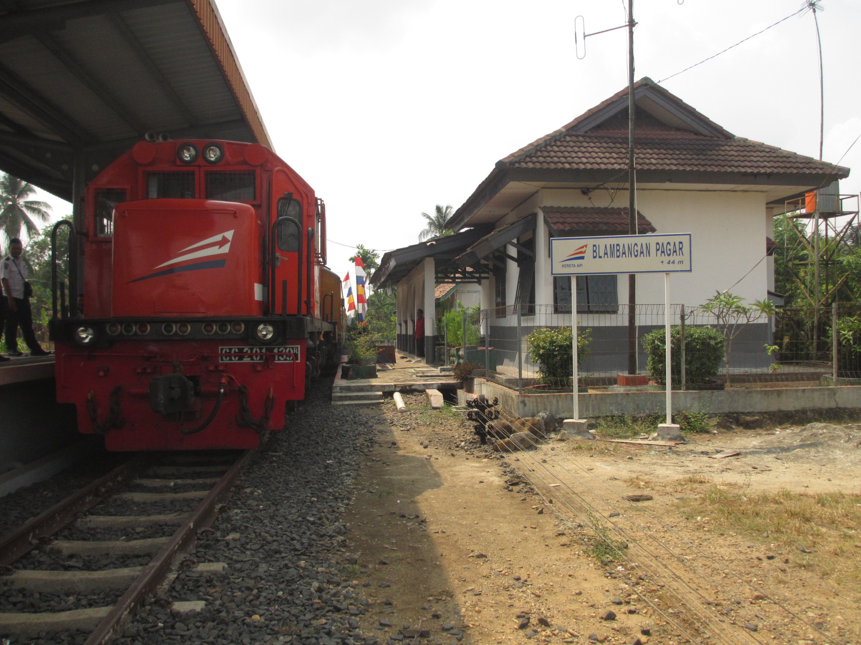 Stasiun Blambangan Pagar saat KA Rajabasa singgah.